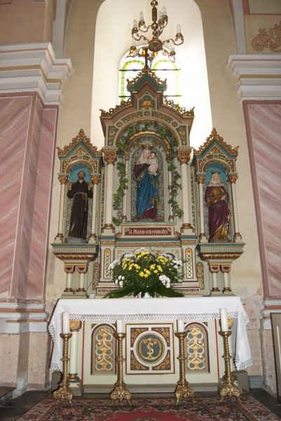 Lubrza – kościół parafialny p.w. św. Jakuba, 1600, XVIII w. (zabytek nr 567/59 z 3.04.1959)